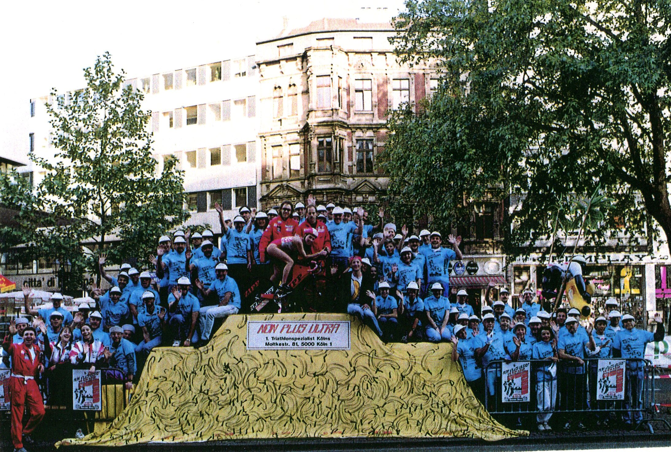 Plastik "Ruhender Verkehr", bedeckt mit Plane, die von Thomas Baumgärtel mit Bananen besprüht wurde anlässlich des Radrennens "Rund um Köln" 1993-94-95)